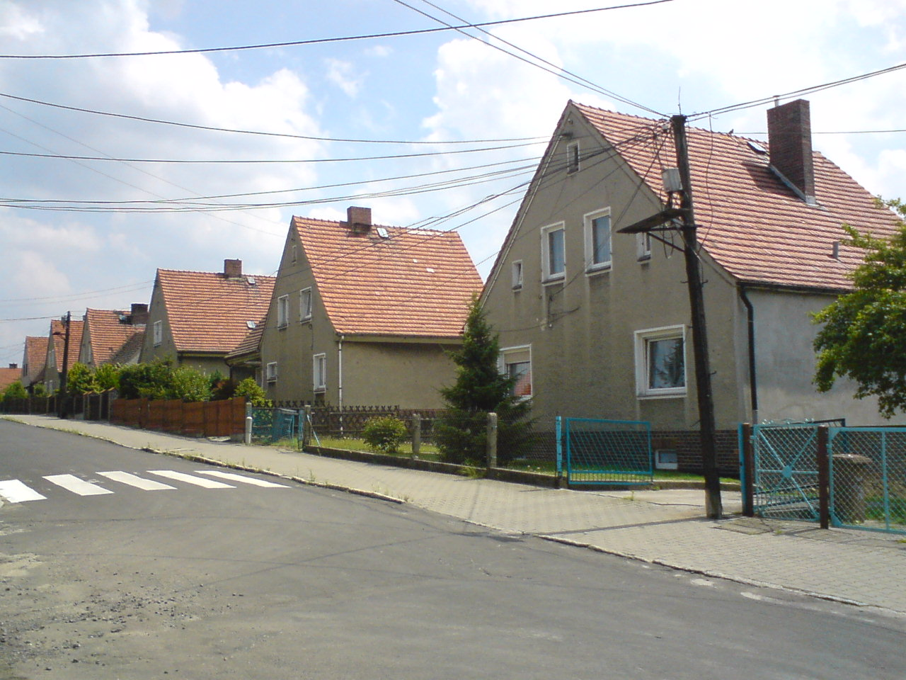 Osiedle Lotnisko (Drzymały Str.), Żary